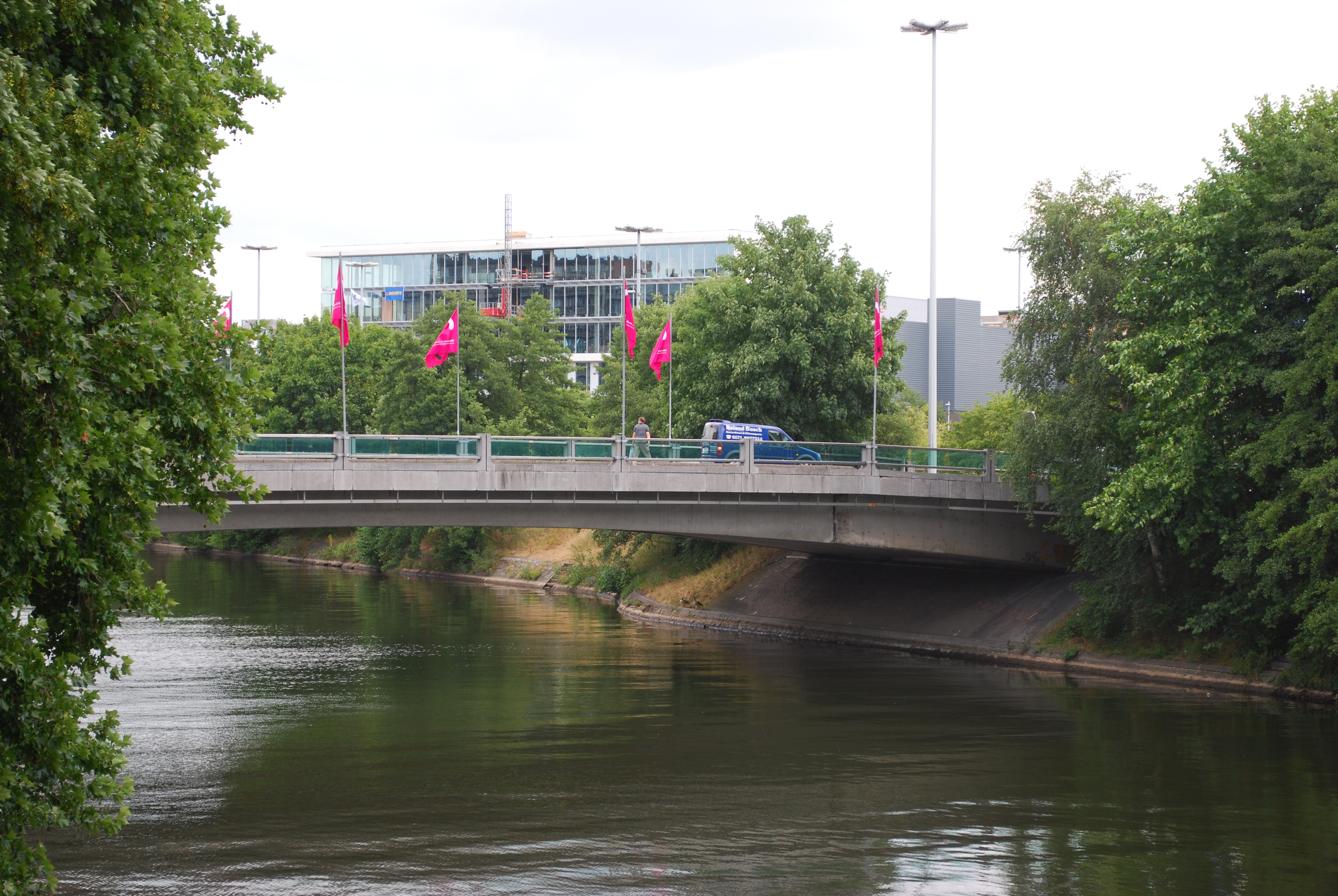 Le Pont des Vennes sur la Dérivation de la Meuse à Liège, vue vers l'aval.